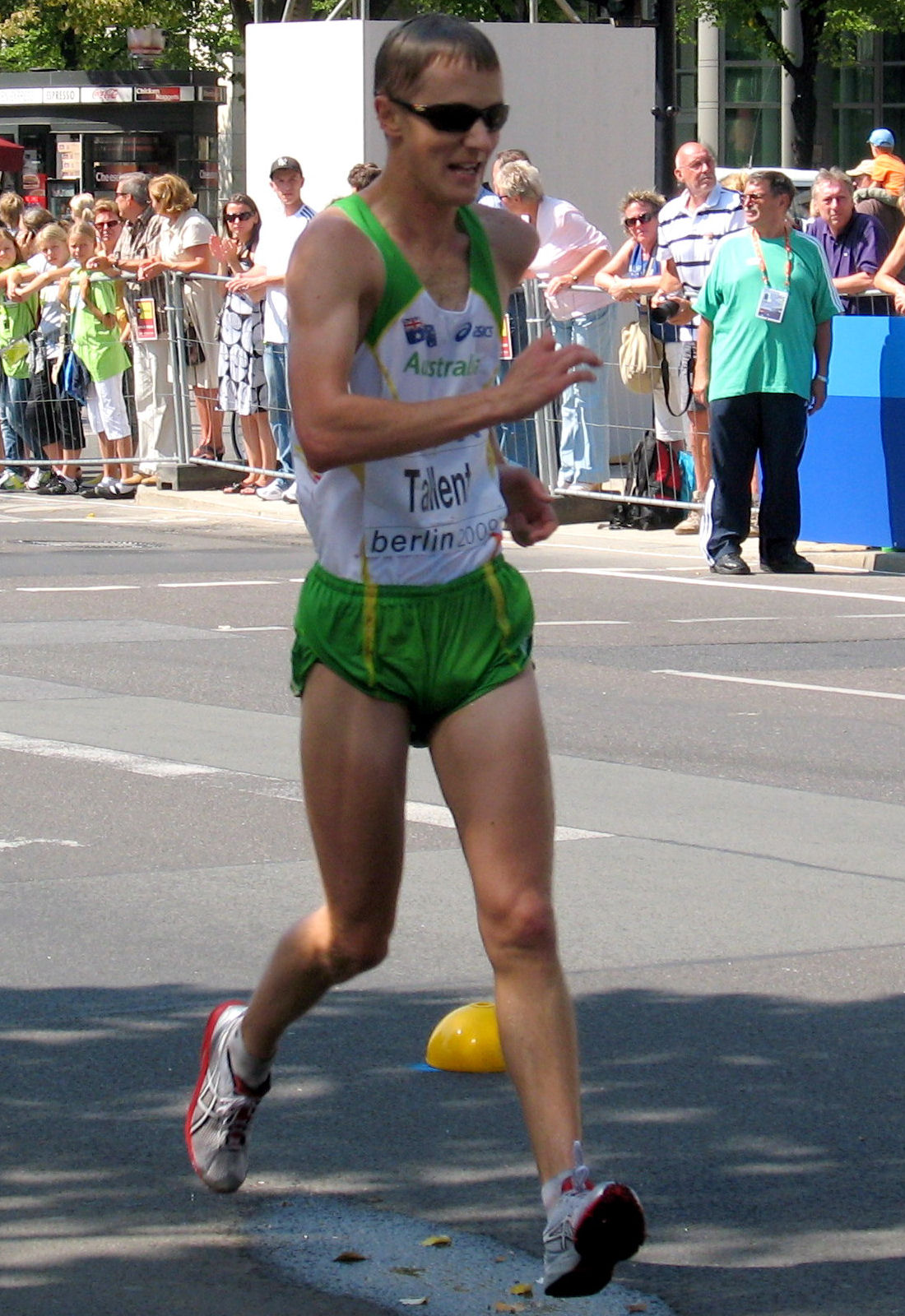 Jared Tallent, 15.08.2009